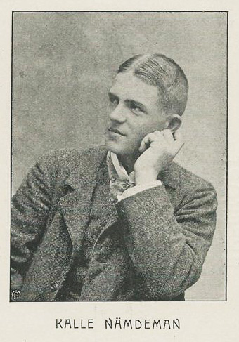 Kalle Nämndeman, stage name for Karl Oskar Fritiof Gustafsson (1883-1945)